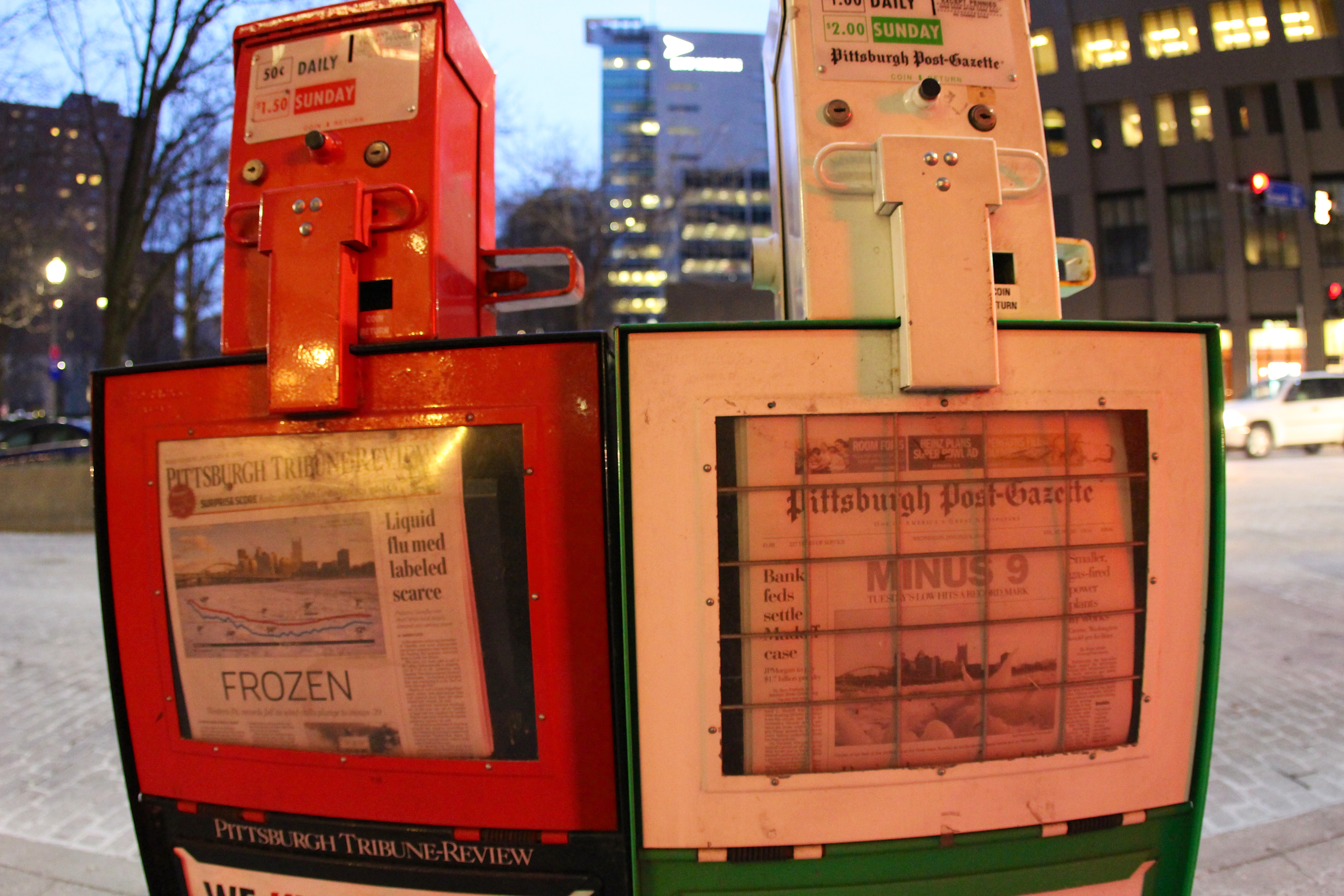 @ Pittsburgh, PA